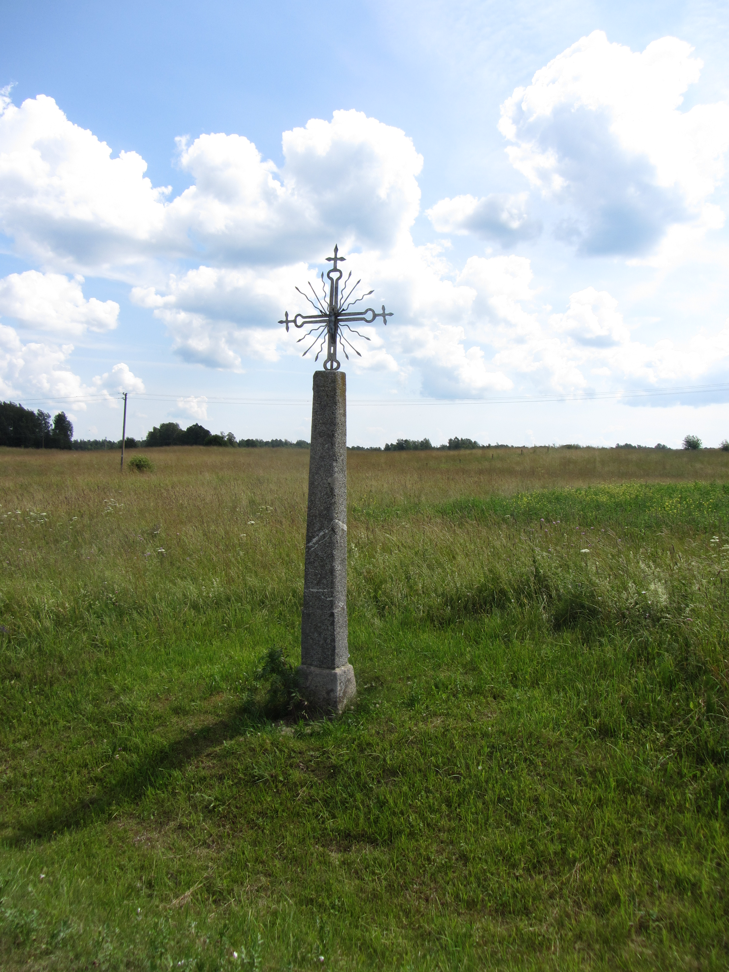 Degučių sen., Lithuania